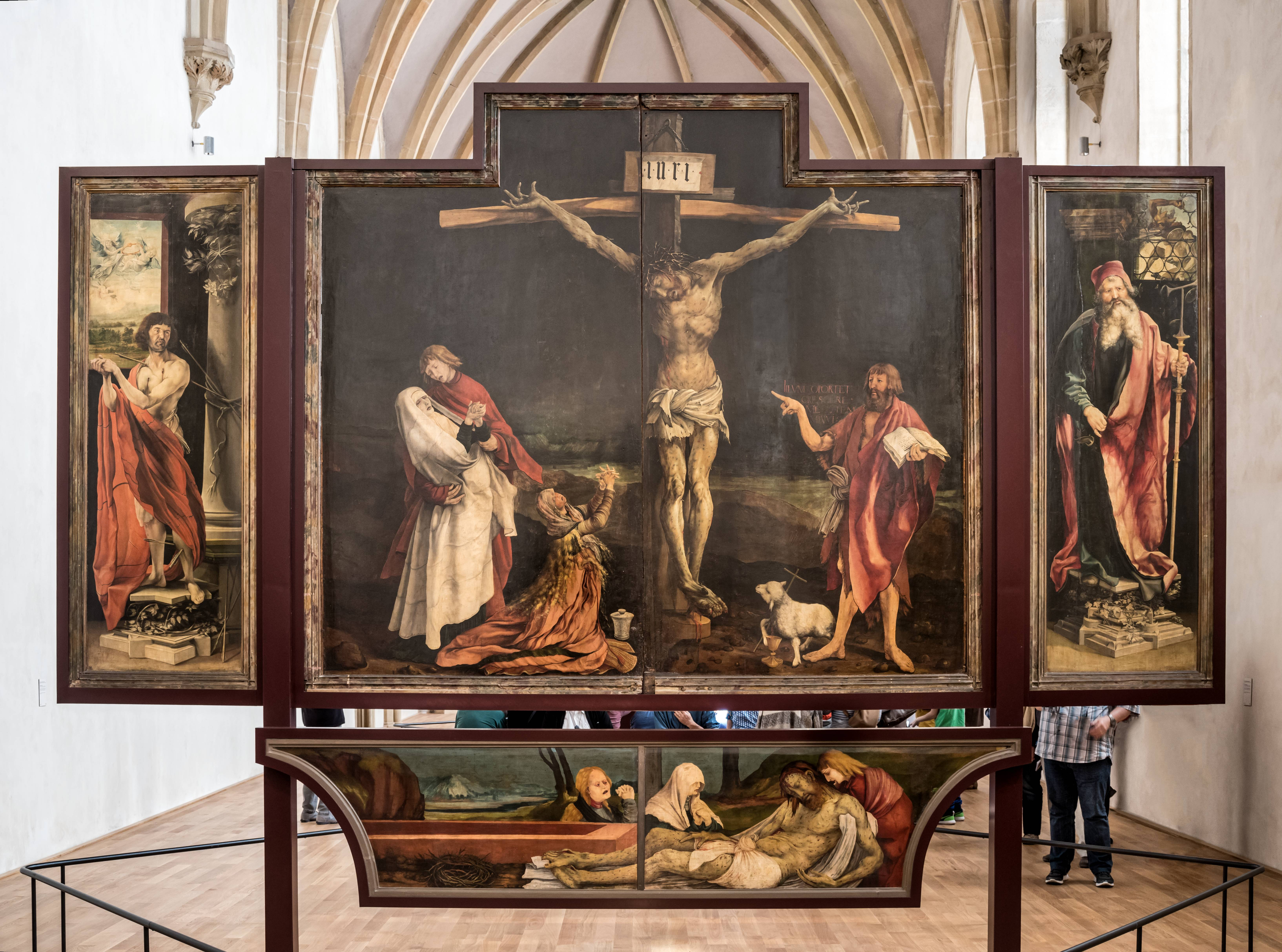 Bilder aus Colmar Der Isenheimer Altar im Unterlindenmuseum in Colmar